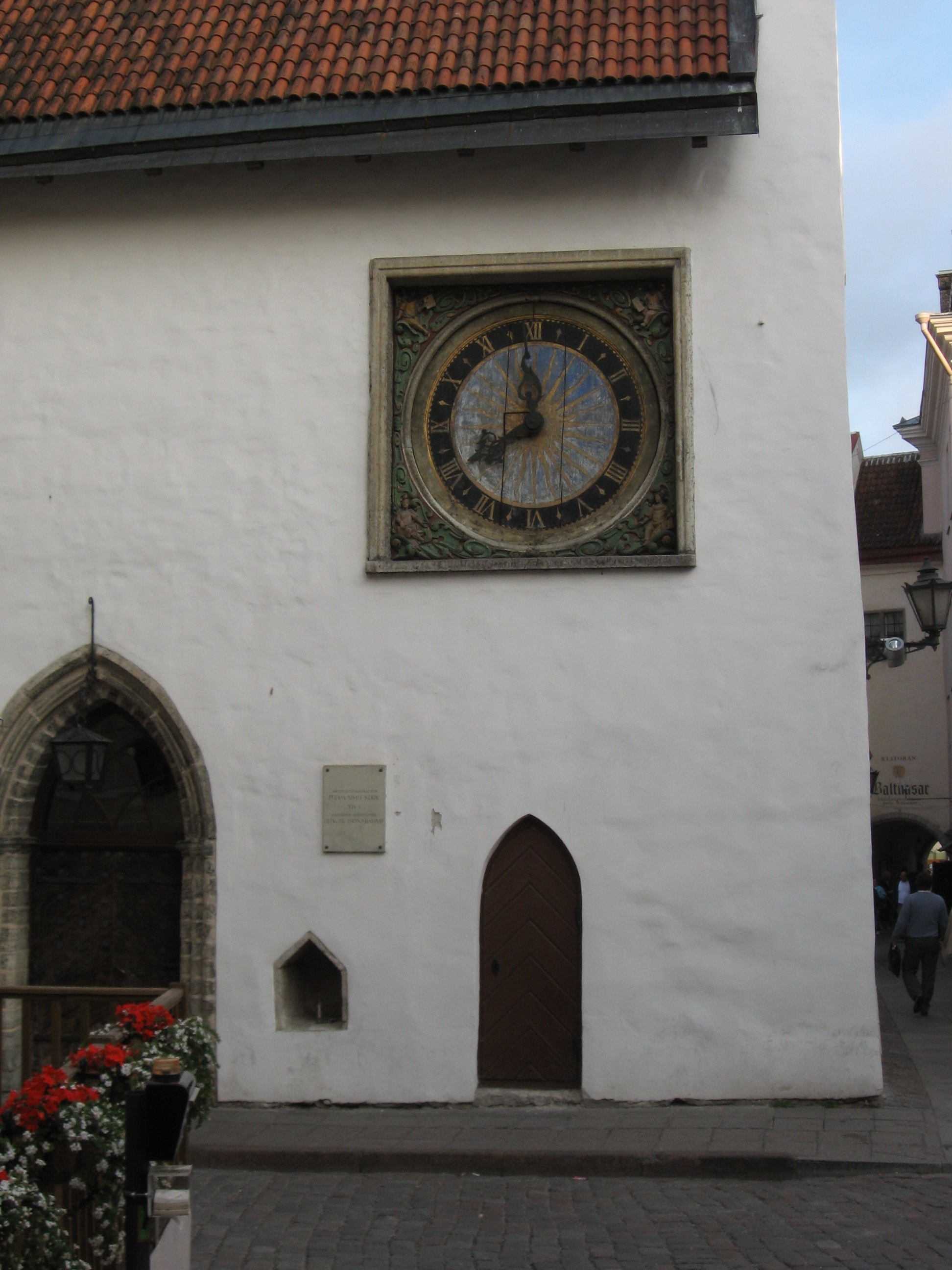 Tallinna Pühavaimu kirik